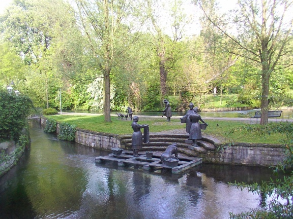 Paderquellgebiet: von der Sparkasse Paderborn gestiftete Figurengruppe an der warmen Pader.